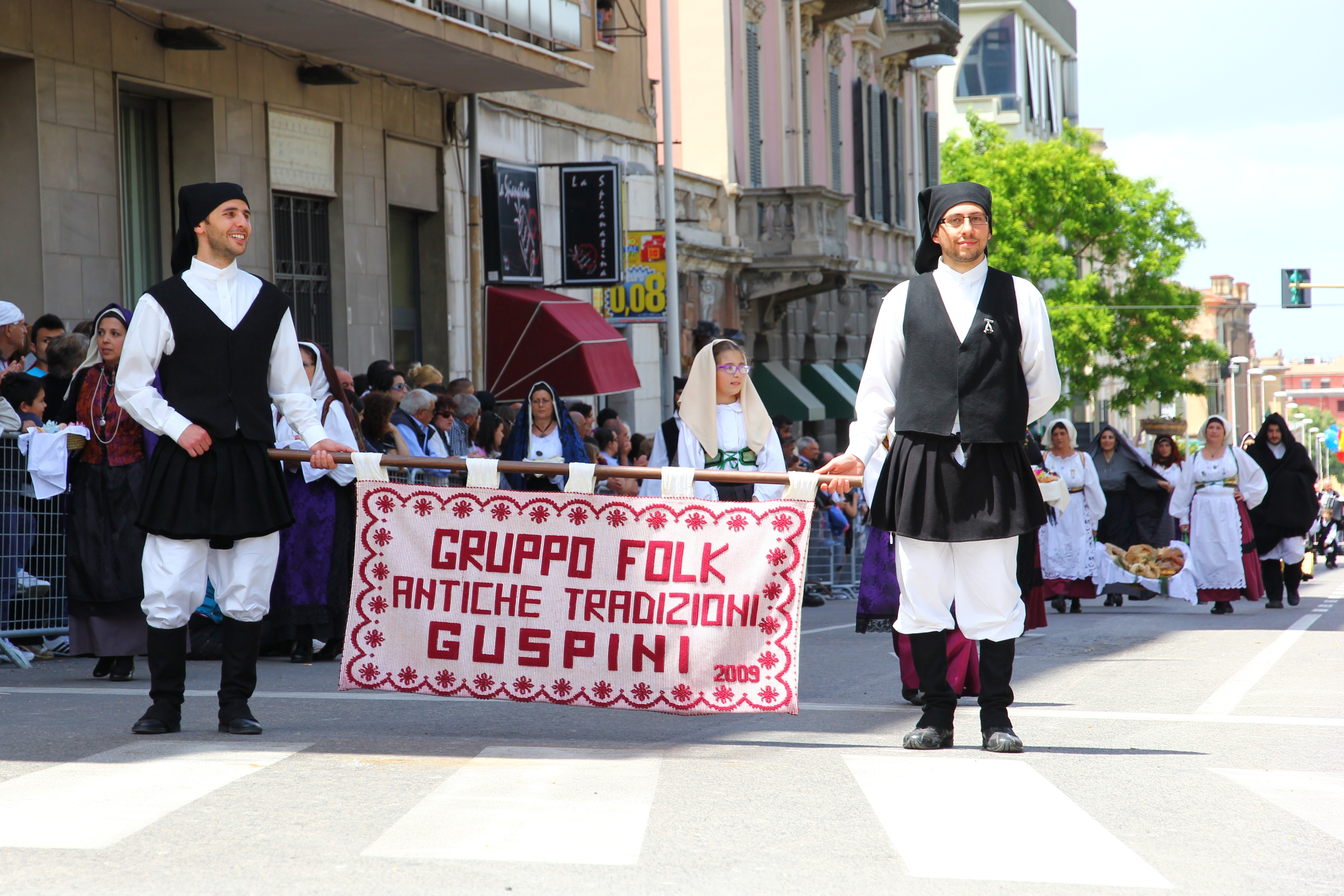 Cavalcata Sarda 2013 (Sassari)